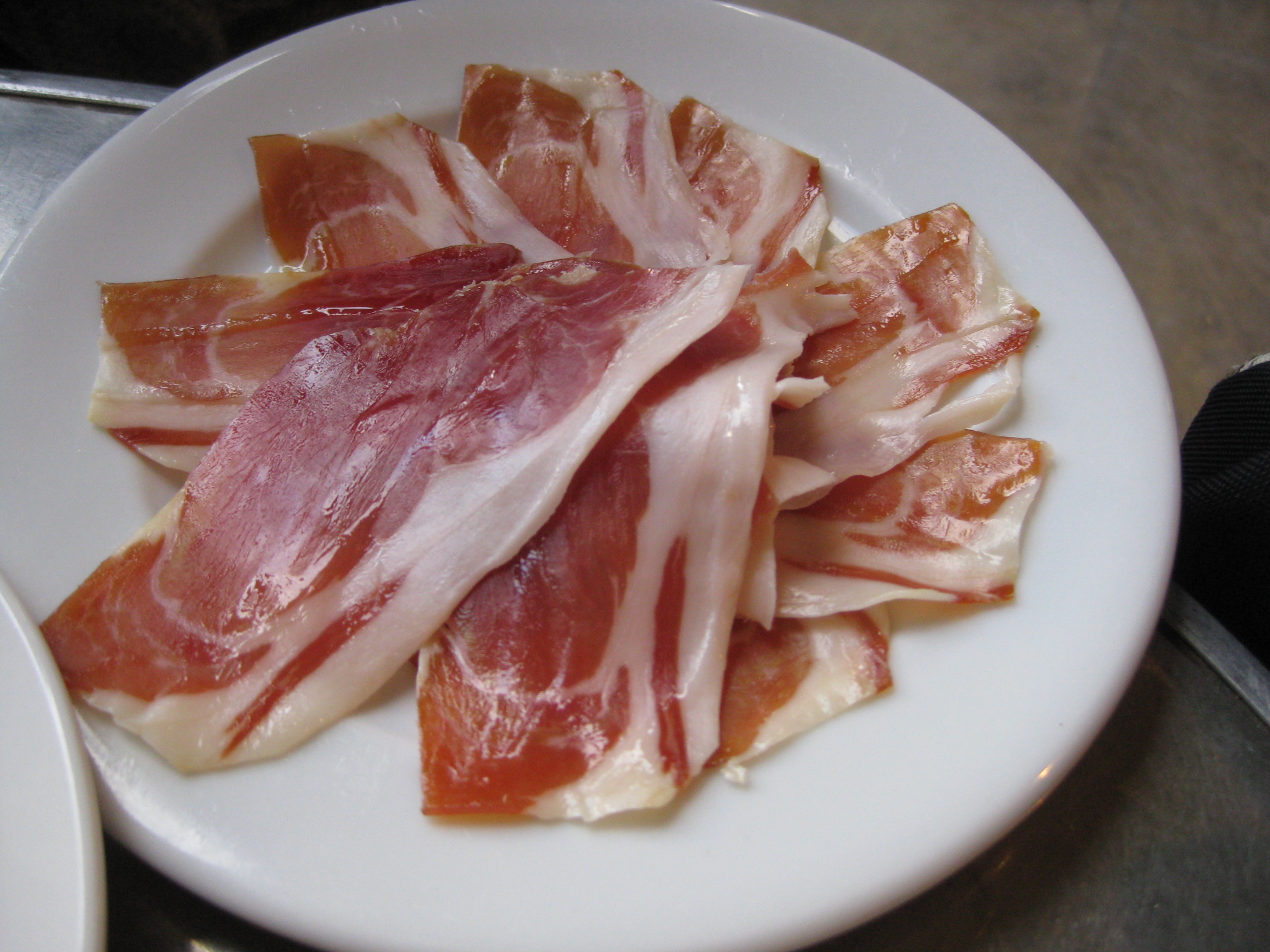 Jamón serrano, Barcelona, Spain